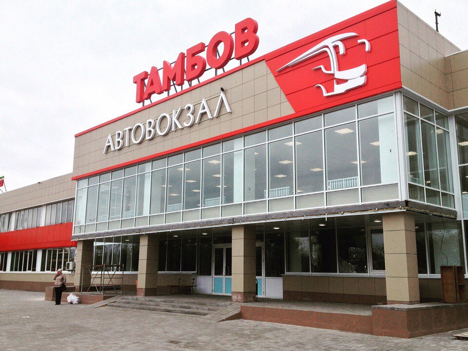 Автовокзал «Тамбов»